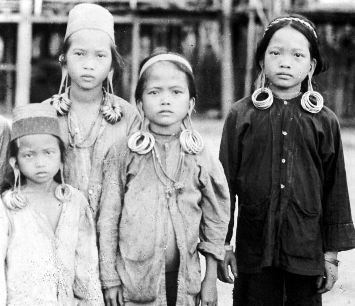 Repronegatief. Kayan meisjes gedeeltelijk in feestkleding met oorringen, Borneo